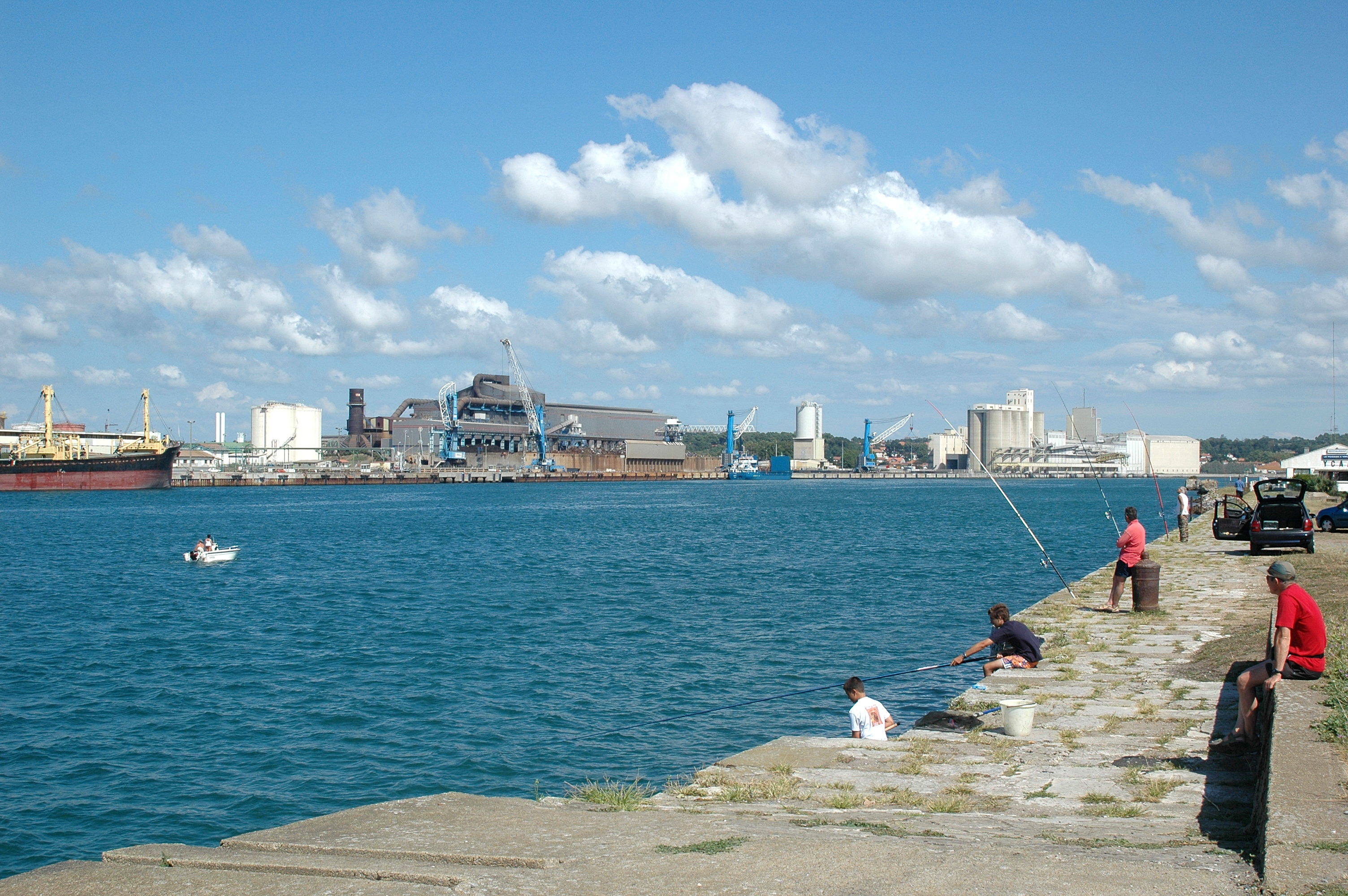 Bayonne, le port. Photo prise le 19/08/06 par Harrieta171